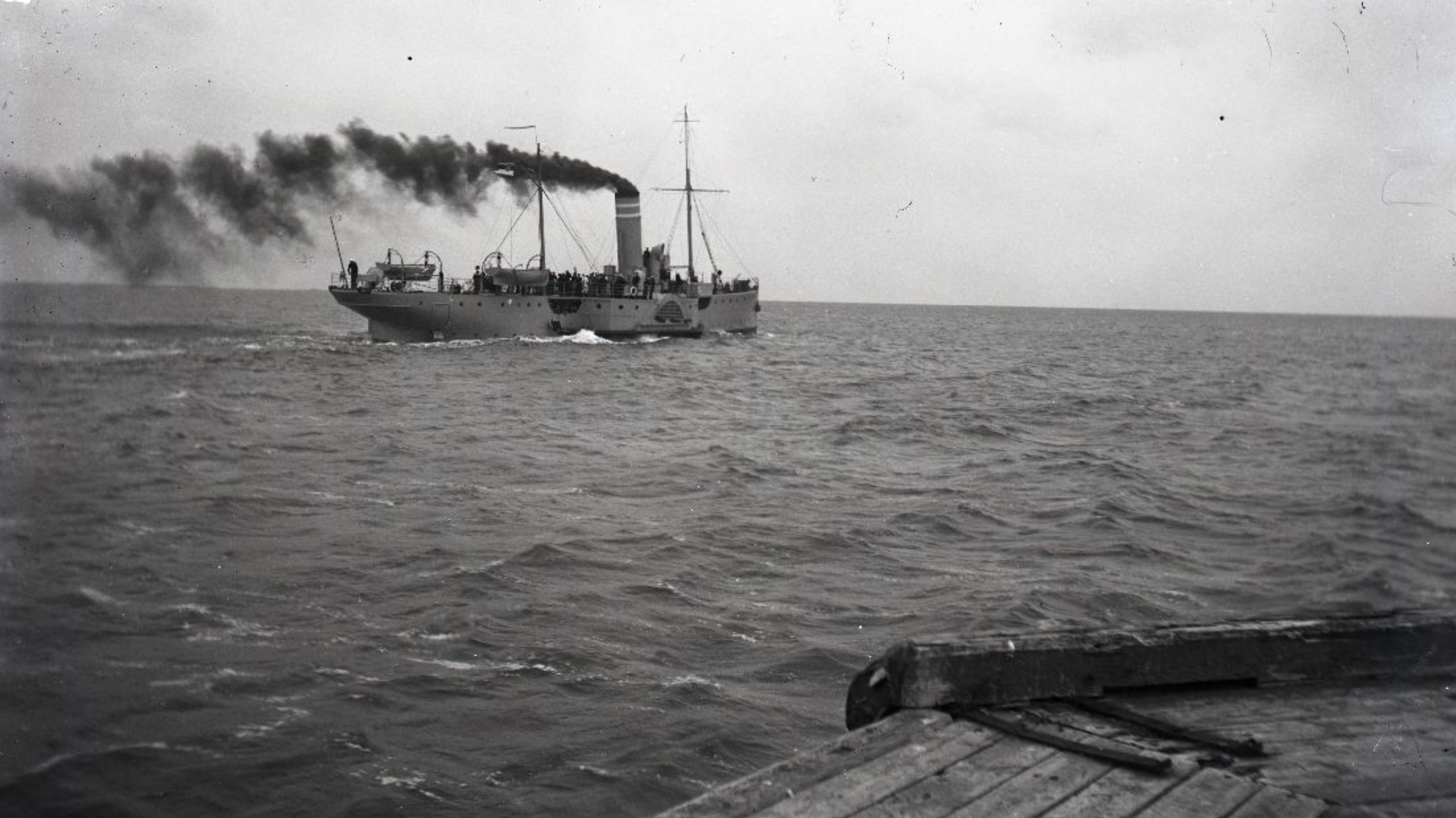 Miiniveeskja Ristna saabumas Roomassaare sadamasse